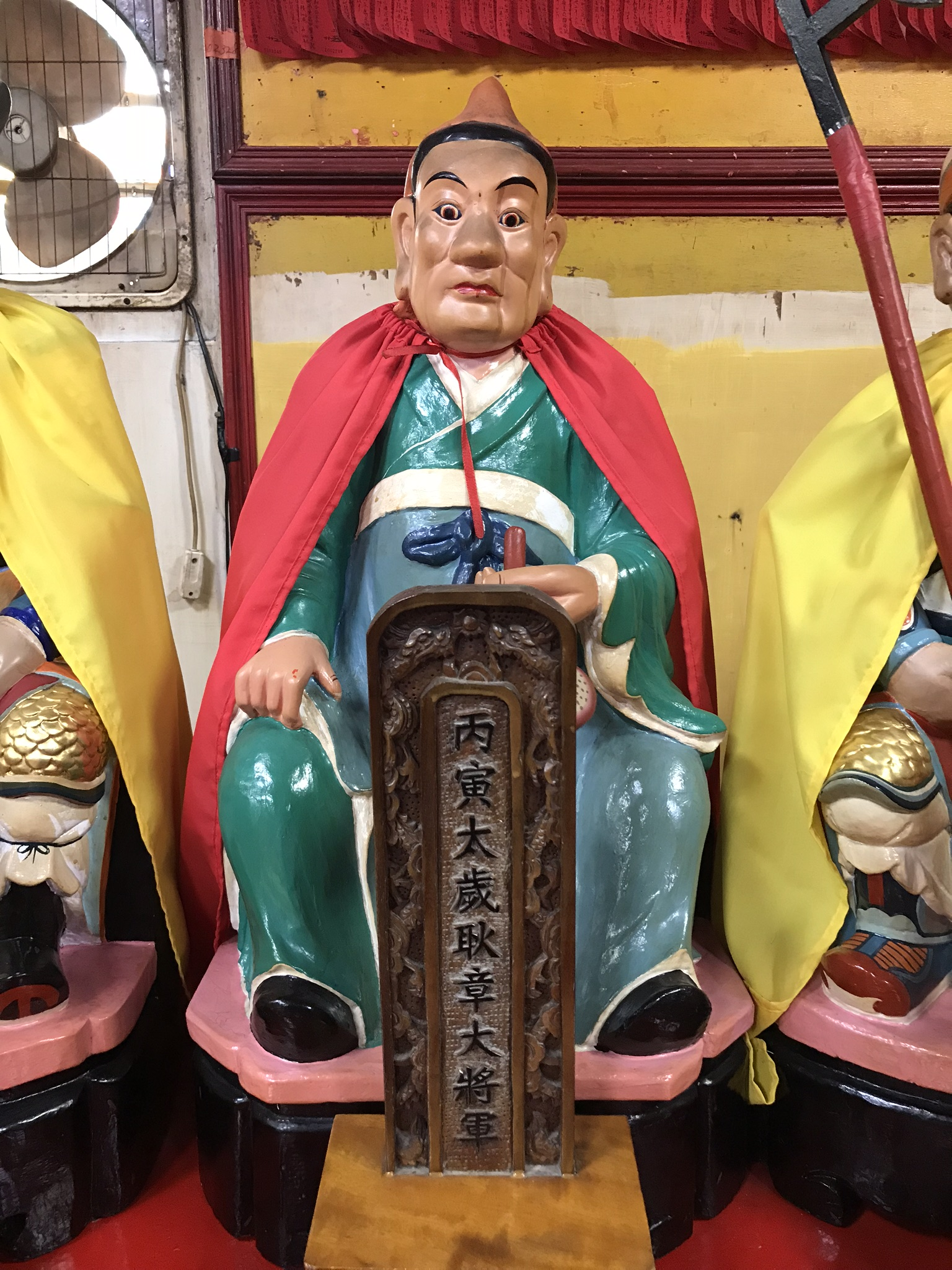 中文（台灣）: 丙寅太歲耿章大將軍神像